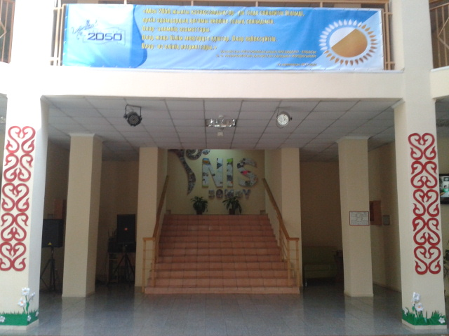 Мектеп іші